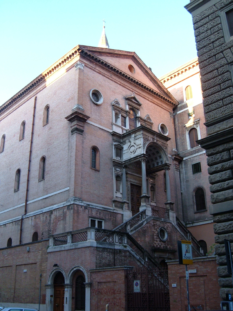 Chiesa di San Giuseppe di Cluny, a Roma, nel rione Monti, in via Poliziano.